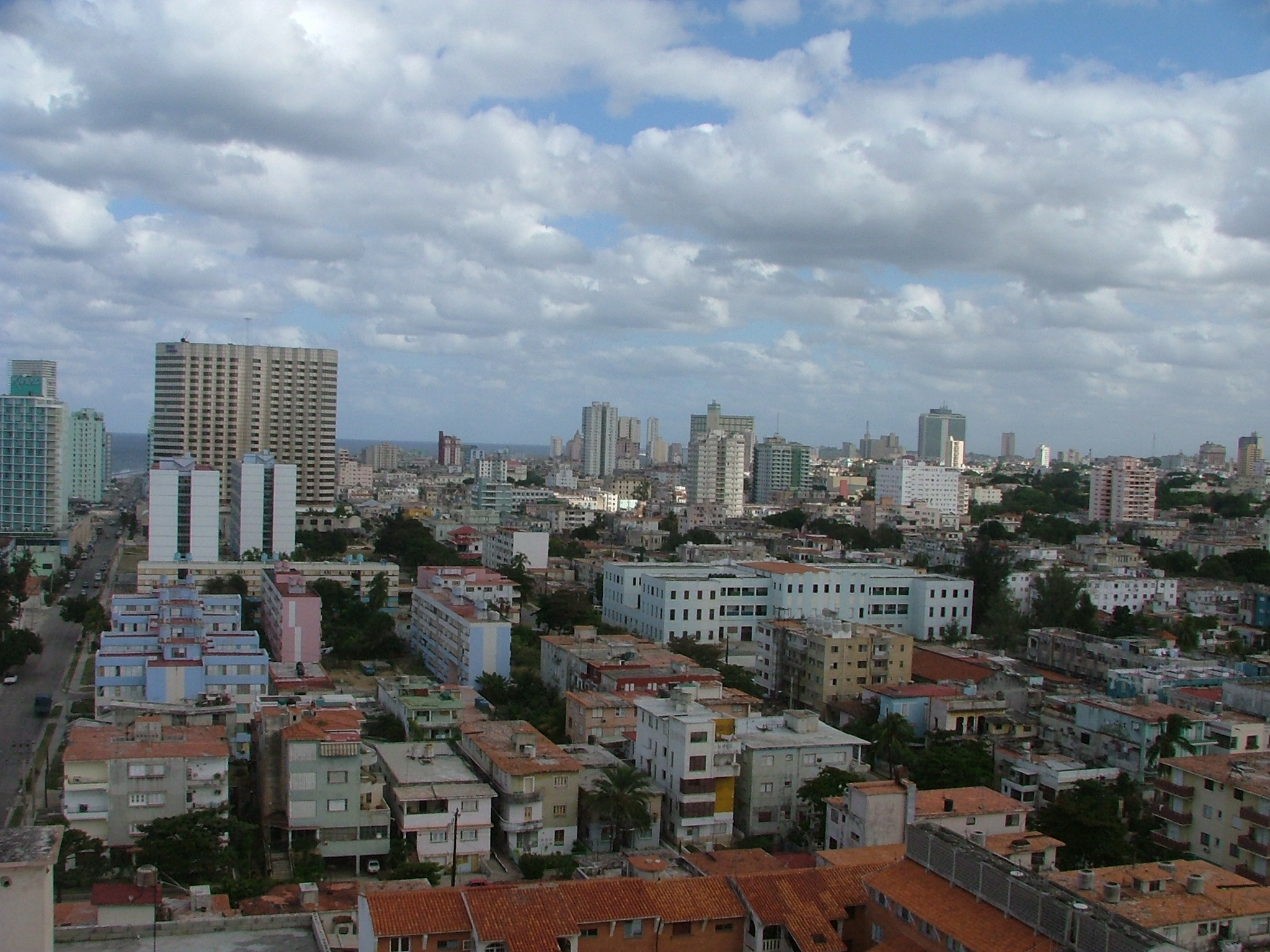 Vista panorámica de la barriada habanera del Vedado